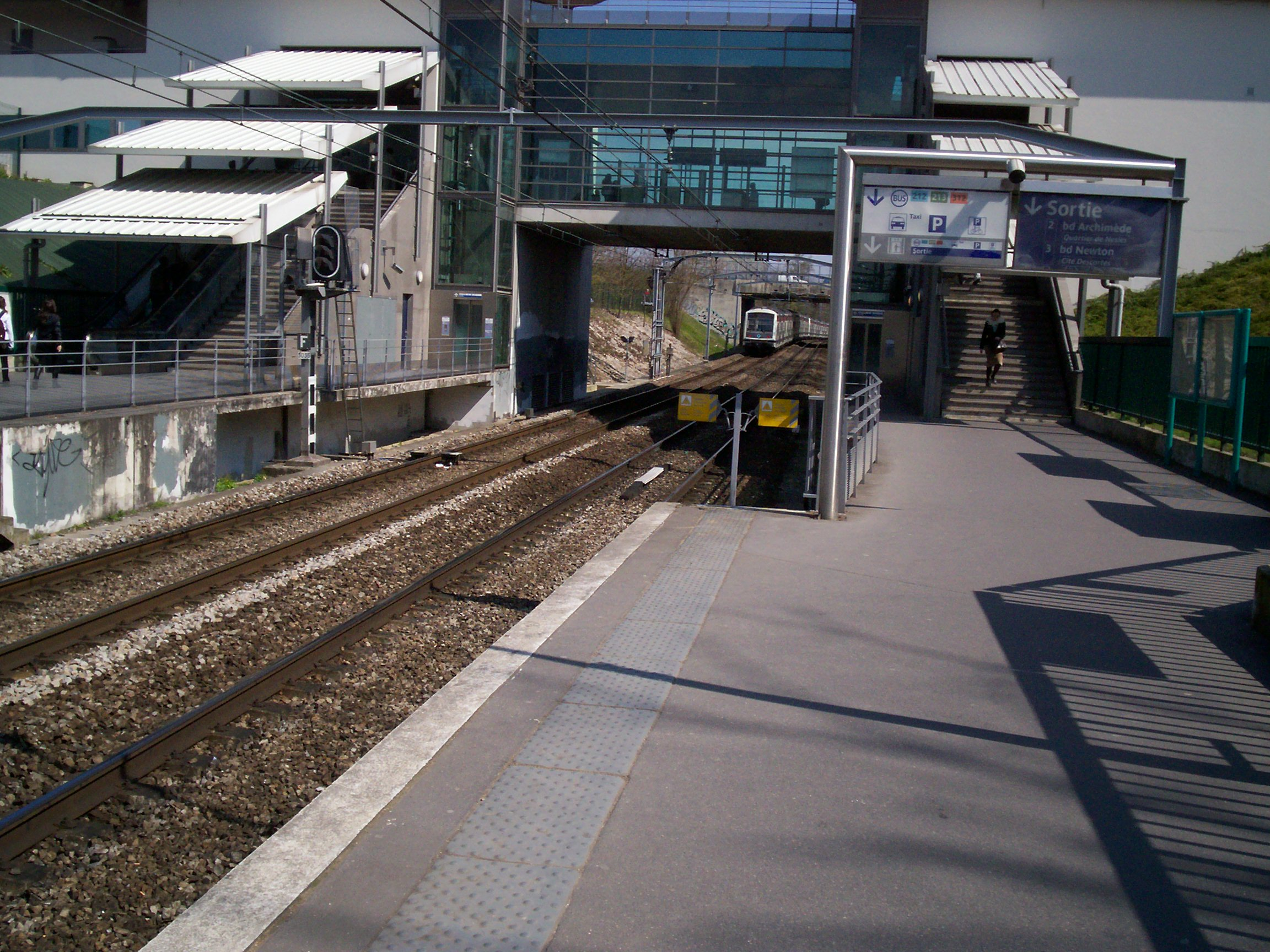 Gare de Noisy Champs